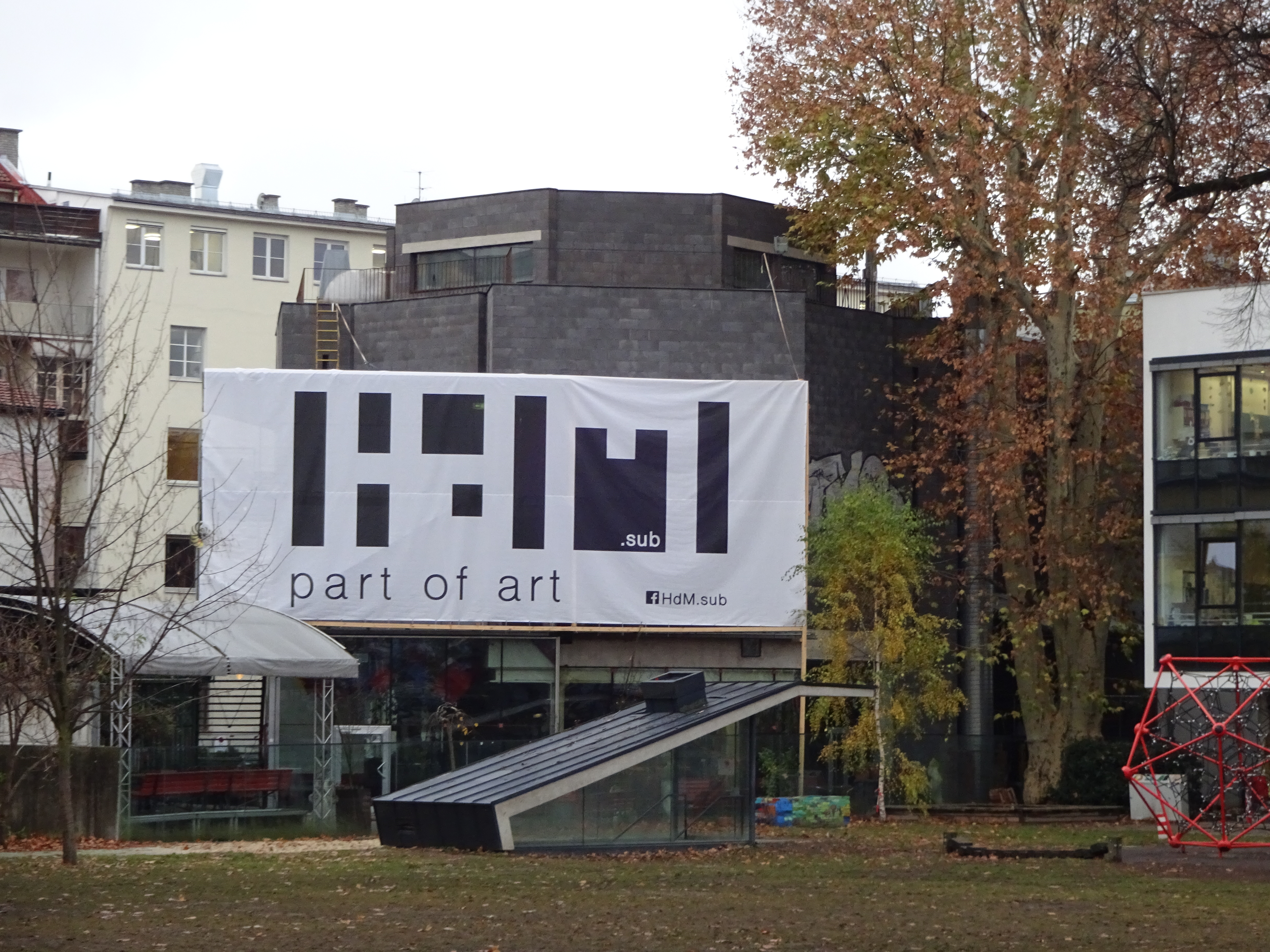 Treibhaus, Theater im Turm, Innsbruck